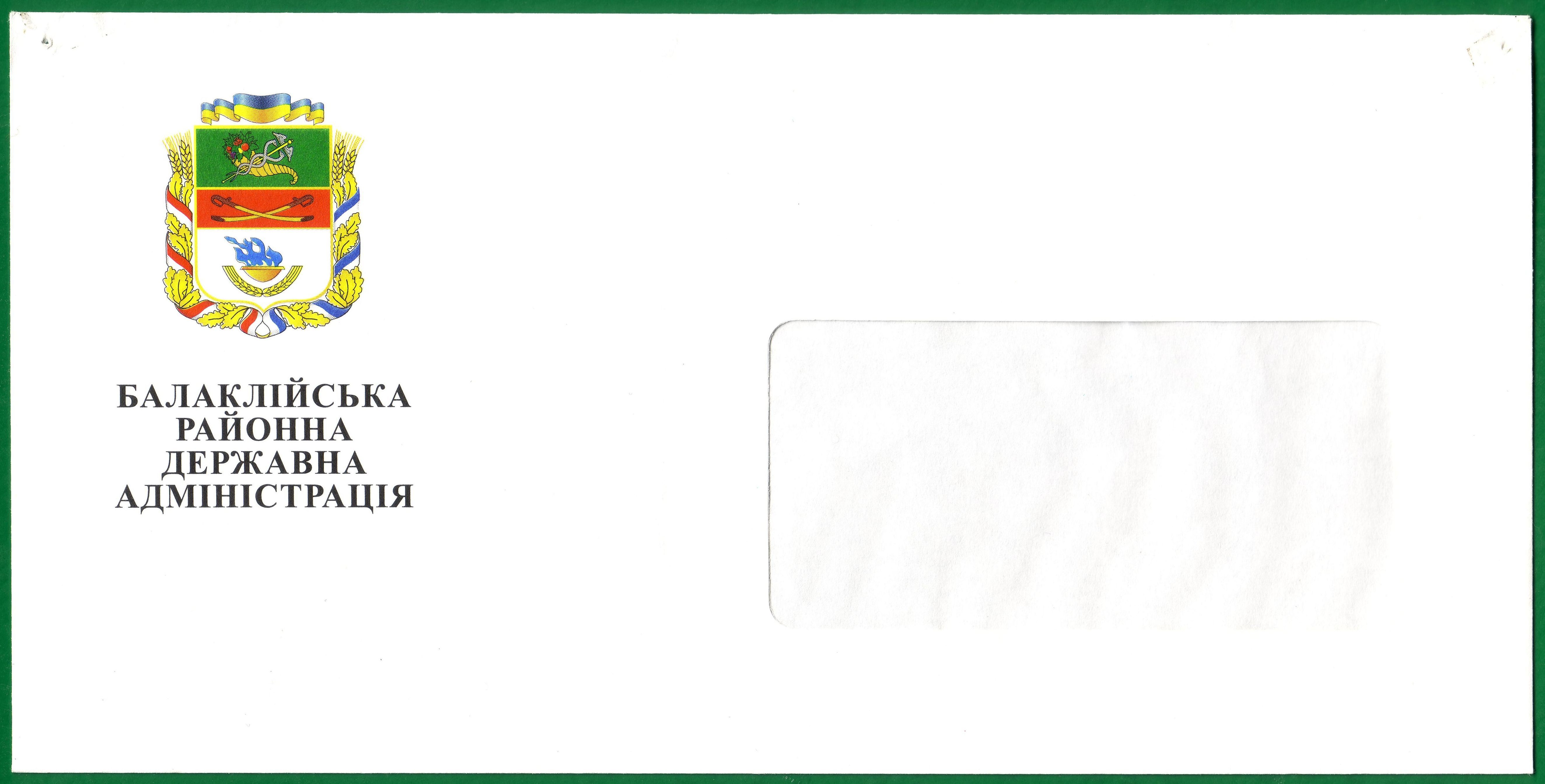 Герб Балаклейского района Харьковской области на официальном конверте администрации, выпущенном в 2005 году